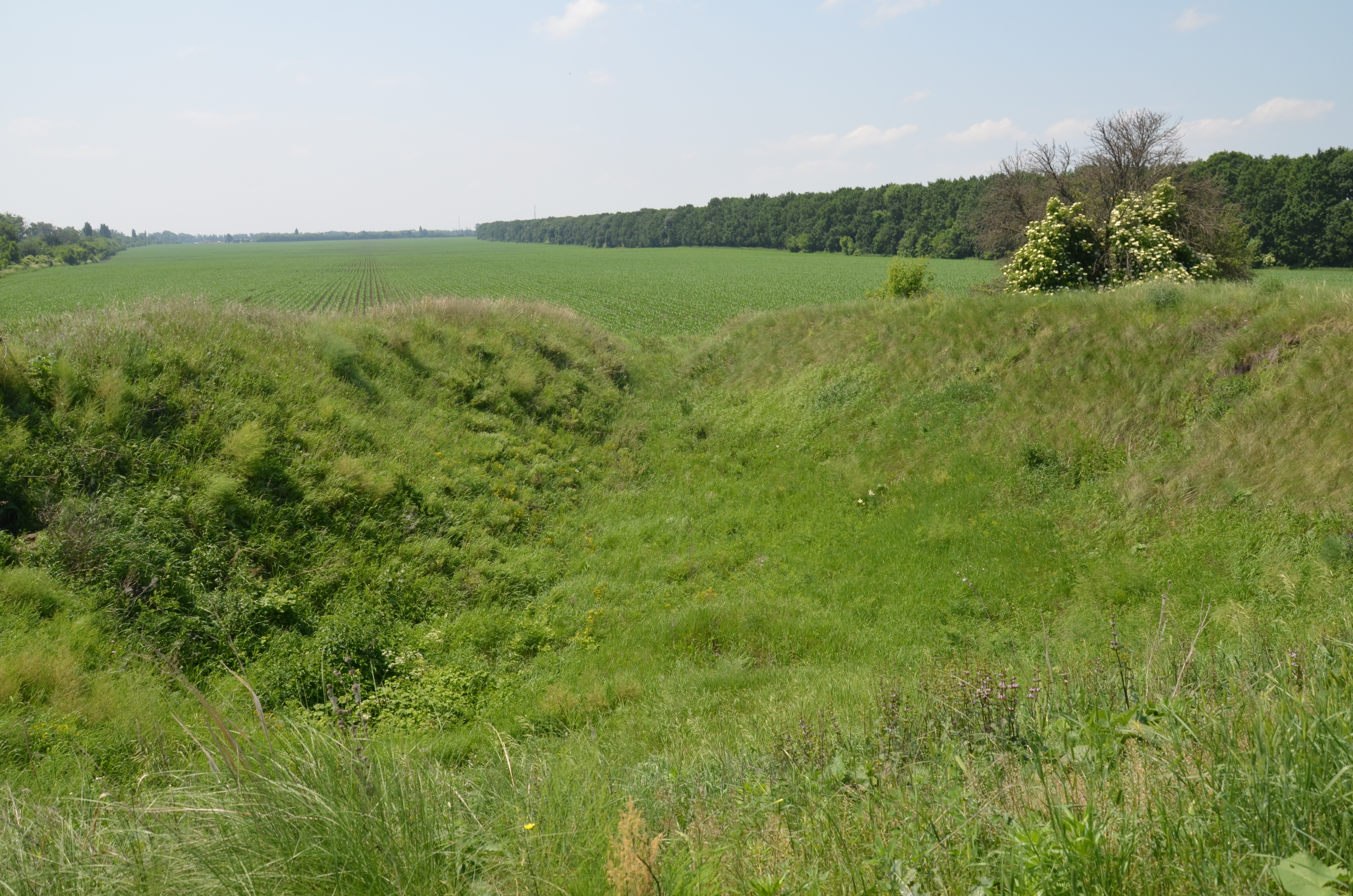 Роблена могила, Переяслав-Хмельницький район, Козлівська сільська рада